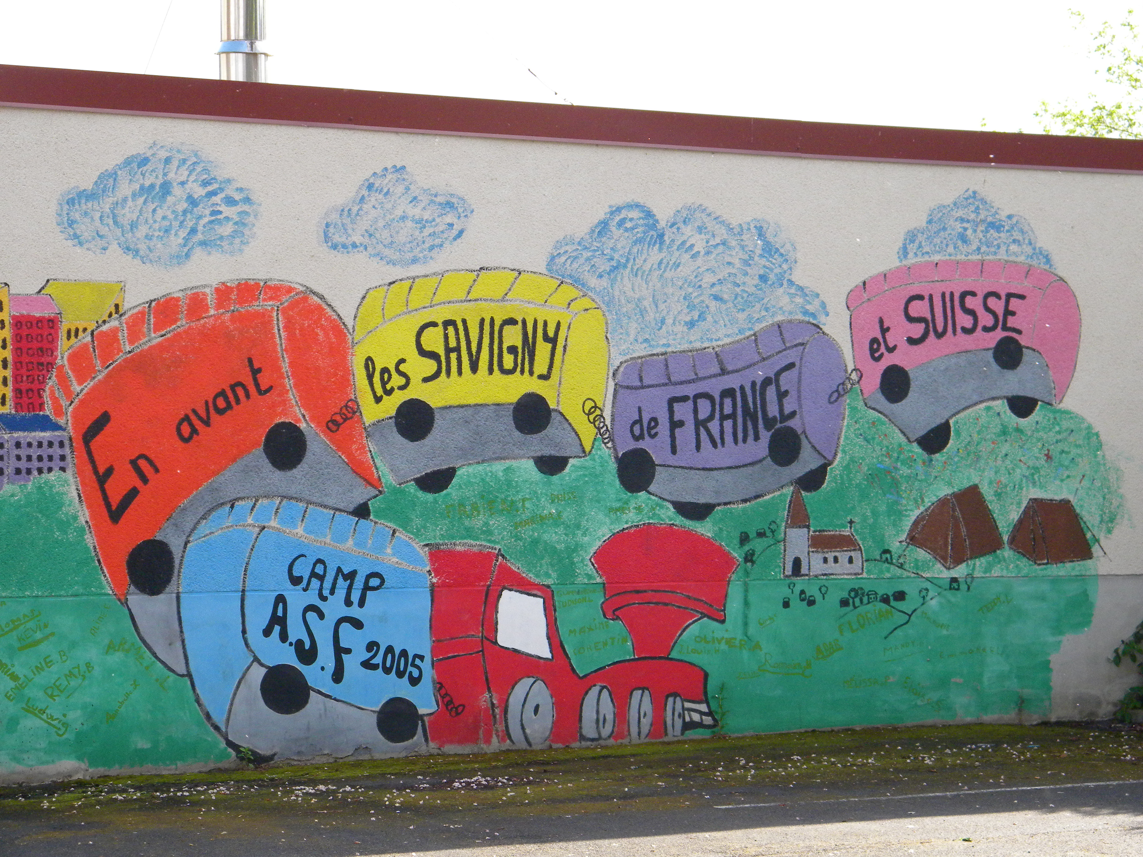 Fresko en Savigny-sur-Braye